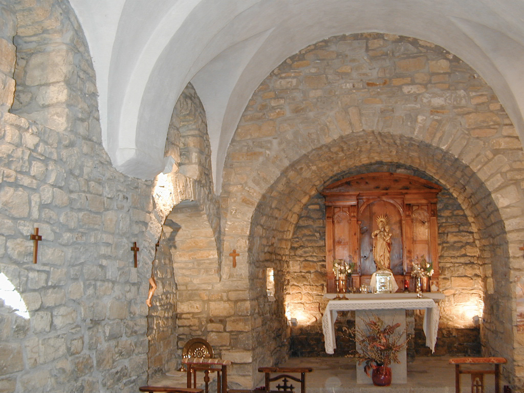 Interior de la capilla de casa Buil.